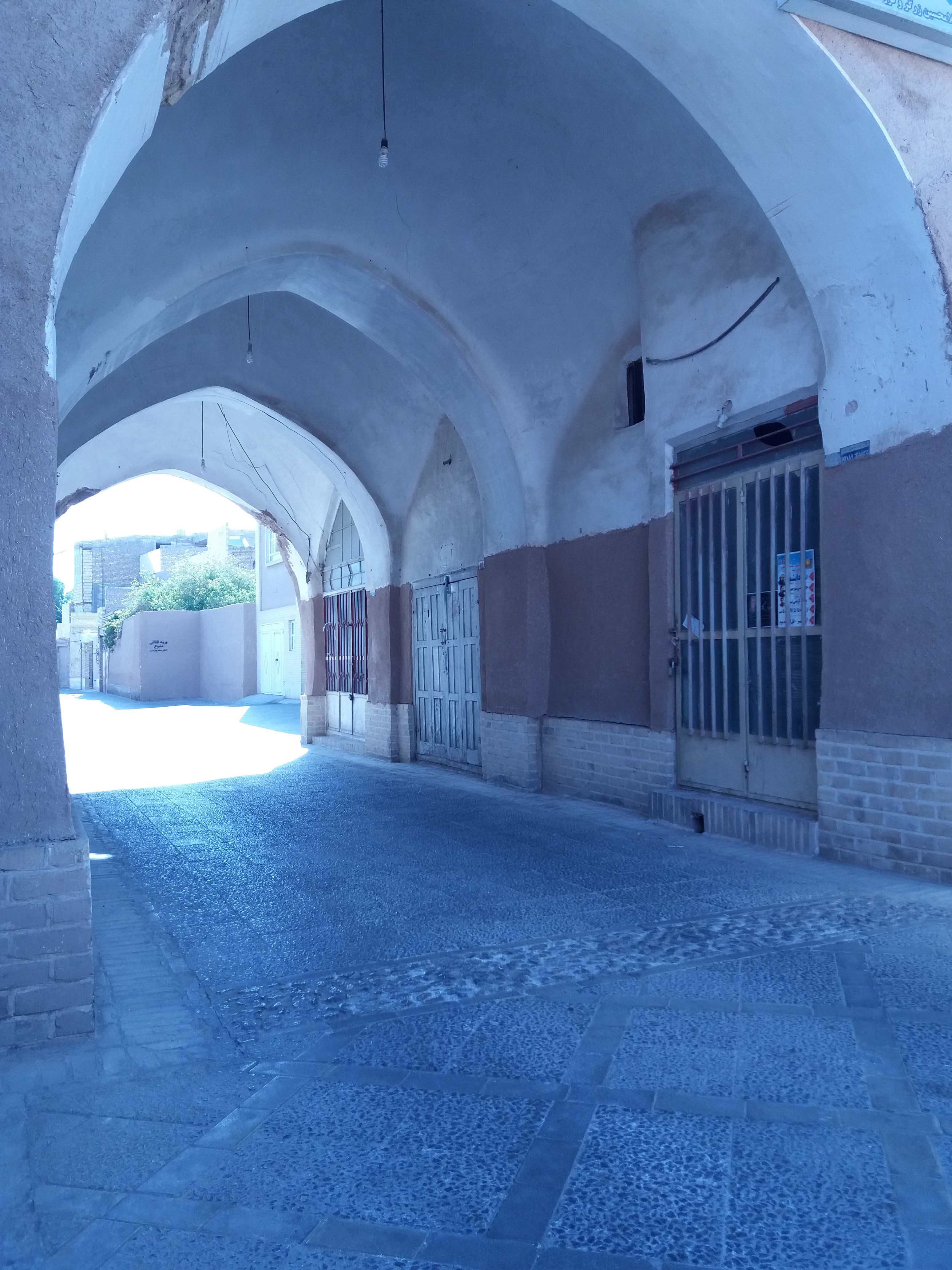 دروازهٔ چهار منار یکی از ردوازه های شهر که محل ورود مسافرین به یزد بوده است